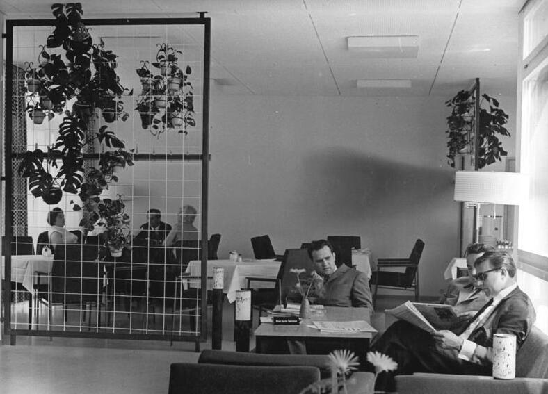 Dresden, Motel, Empfangshalle Zentralbild Franke ku-no 19.6.67 Volkswahl 1967 Erstes Motel der DDR in Dresden Autoreisende finden jetzt eine moderne und behagliche Unterkunft in dem neuen Motel Dresden. Unser Foto zeigt einen Blick in die Empfangshalle. 232 Betten in Ein-, Zwei- und Drei-Bettzimmern, die mit allen Bequemlichkeiten ausgestattet sind swie 118 Restaurantplätze und 70 Terrassenplätze bietet das Haus der Vereinigung Interhotel.